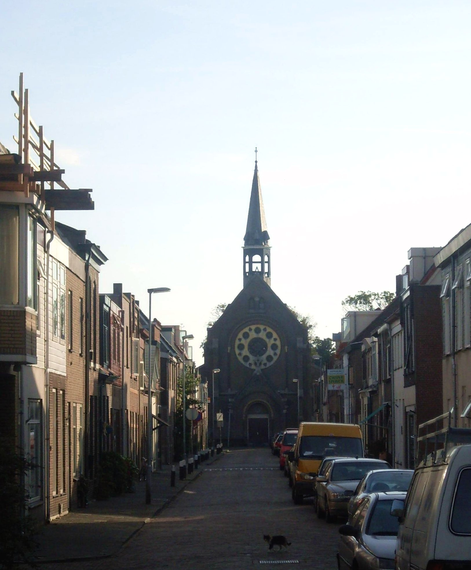 Zicht op de kerk van Onze Lieve Vrouwe Onbevlekt Ontvangen